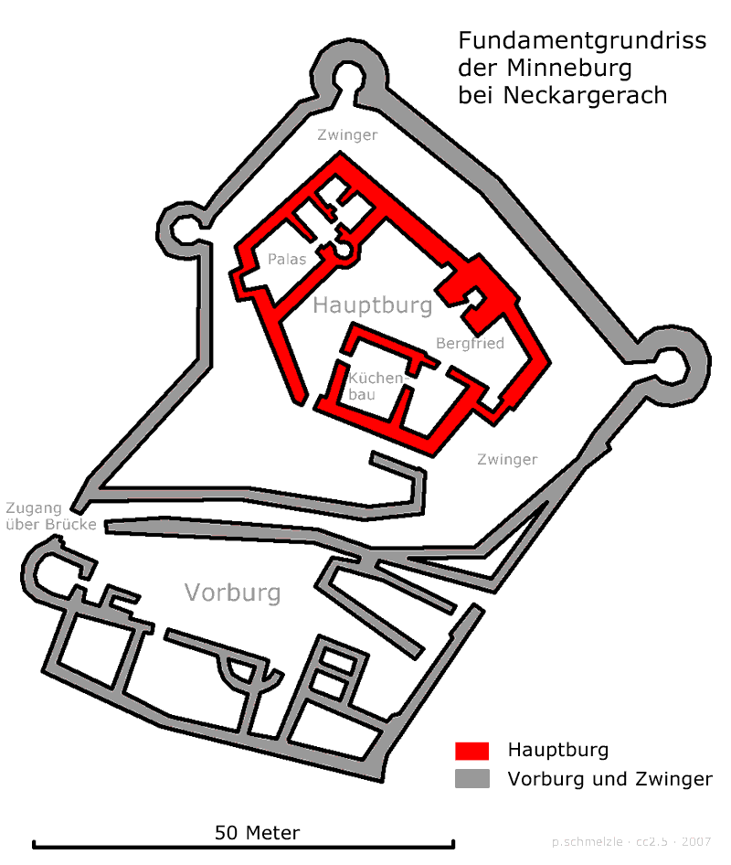 Fundamentgrundriss der Minneburg bei Neckargerach, Baden-Württemberg, Deutschland